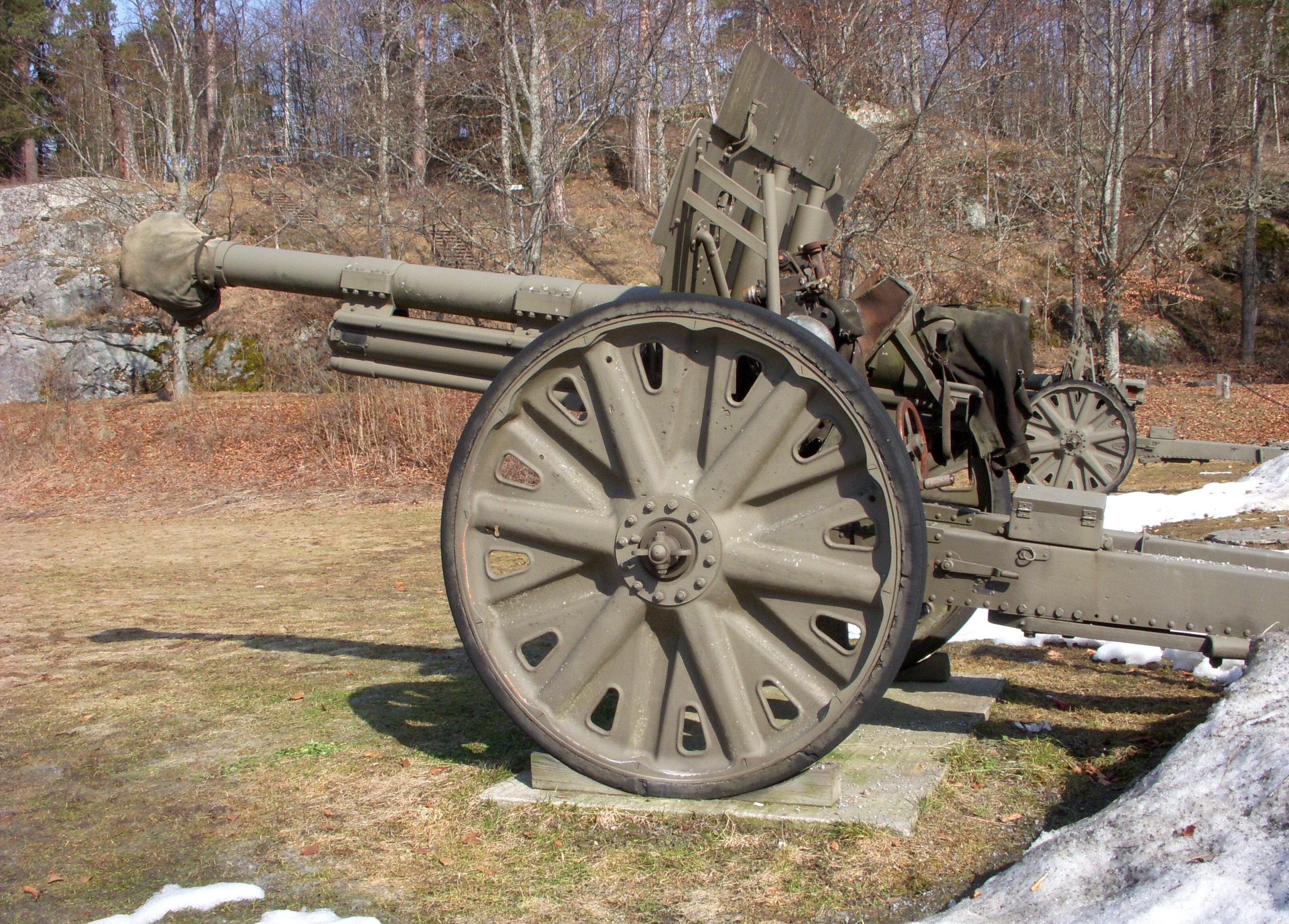 Haubits m/40 H (H = Holland)